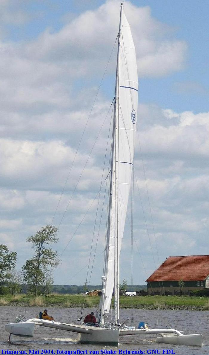 Trimaran, fotografiert im Mai 2004 von soebe Titel: Trimaran im Nord-Ostsee-Kanal Foto: soebe, 21.05.2004 Lizenz: GNU-FDL Beschreibung: Das Foto entstand während meiner Radtour von Hamburg nach Eckernförde. Der Trimaran segelt mit eingerollten Vorsegeln und gesetztem Großsegel durch den Nord-Ostsee-Kanal.